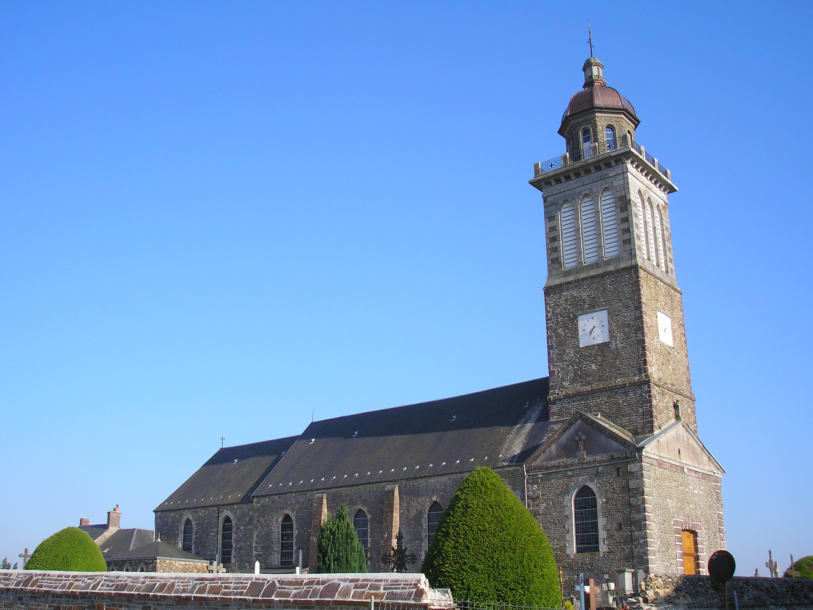 Saint-Amand (Normandie, France). L'église.